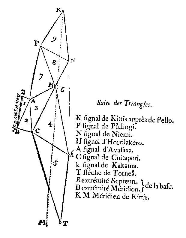 Tracé de la triangulation d'après Outhier.